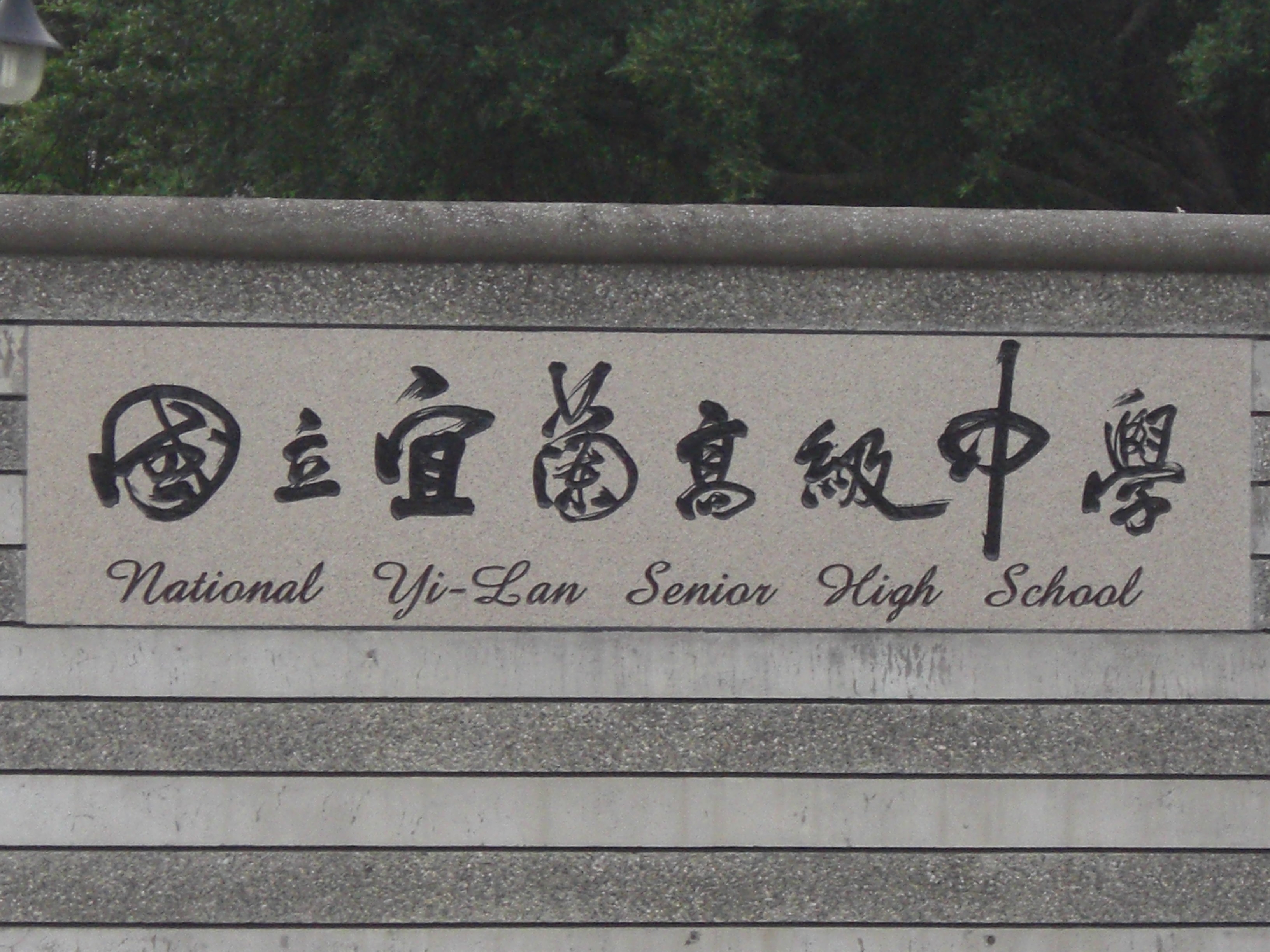 中文（台灣）: 宜蘭高中校門口校名牌，